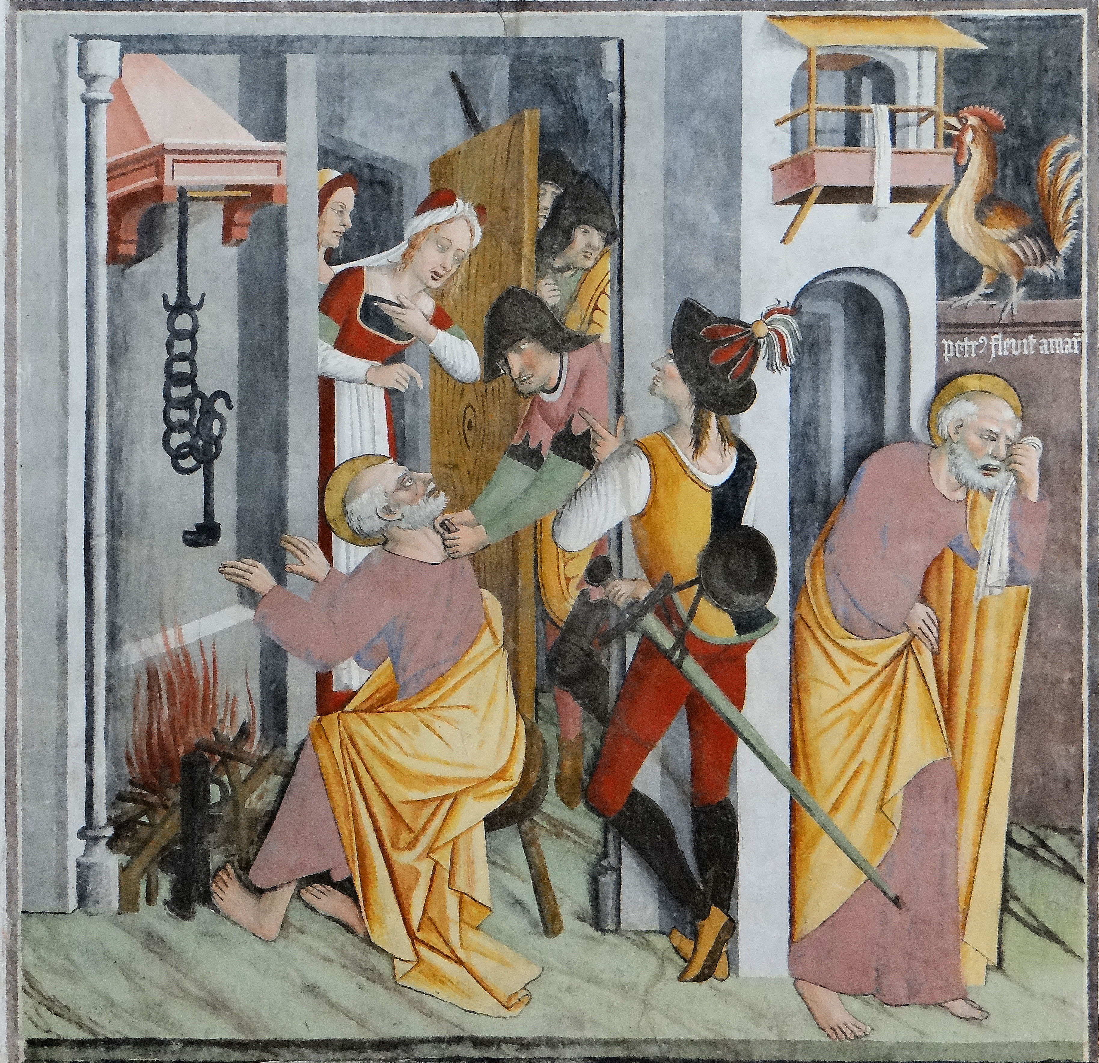 La Brigue - Chapelle Notre-Dame-des-Fontaines - Nef - Fresques de la Passion du Christ - CAPITULUS X : QUALITER PETRUS PERCUSSUS VOCE ANCILLE HOSTIARIE NEGAVIT CHRISTUM (Comment Pierre, frappé par la voix de la servante, nia le Christ)